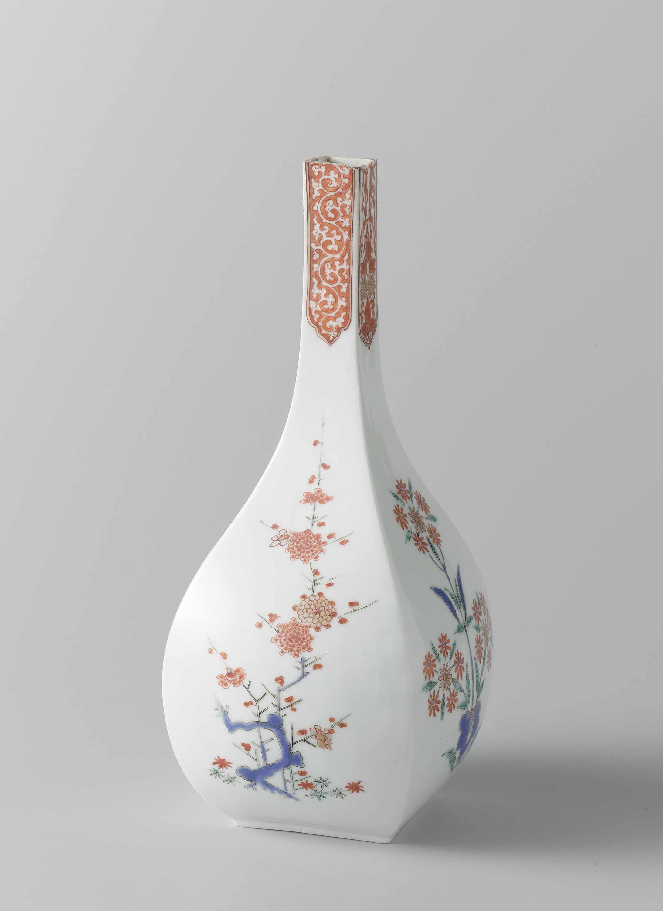 Vierkante fles van porselein, met lange hals, beschilderd op het glazuur in blauw, rood, groen, zwart en goud met afwisselend op de vier wanden prunus en gestileerde bloemen. Op de hals goud omlijste velden met afwisselend bladranken met een bloem en bladranken uitgespaard in het fond. Kakiemon. Hals afgekort. Label Line: anoniem, ca. 1670 - ca. 1690, vergulden